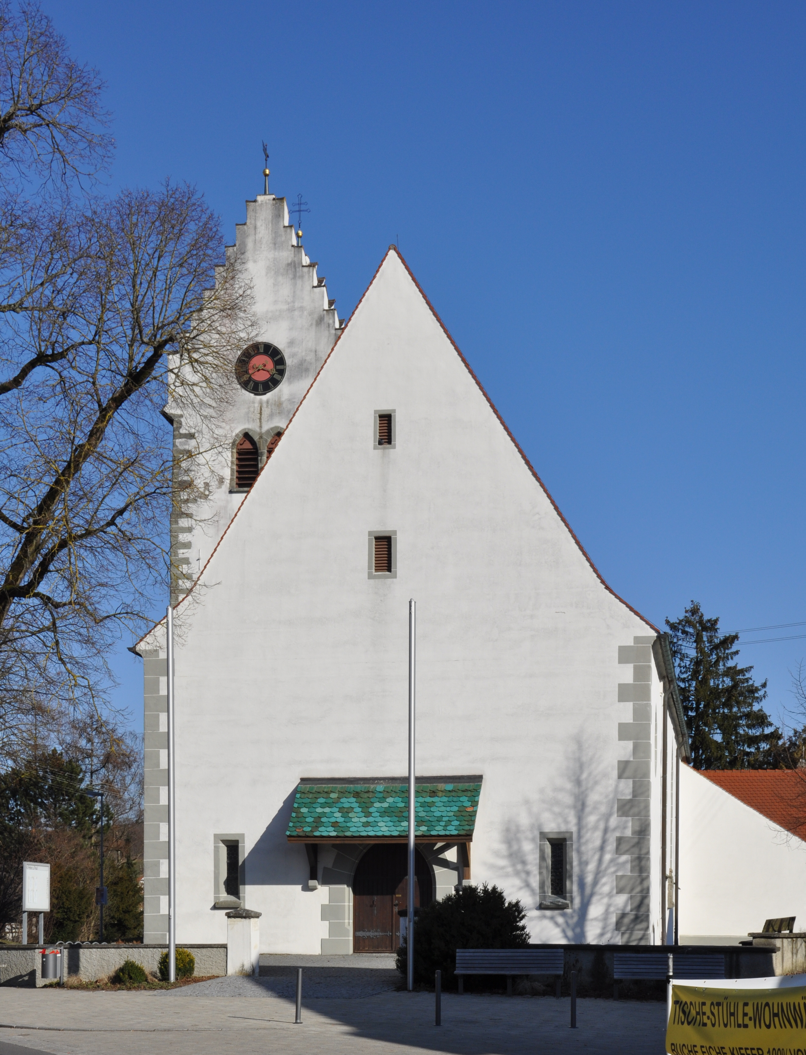 Pfarrkirche St. Peter und Paul, Owingen, Bodenseekreis Außenansicht